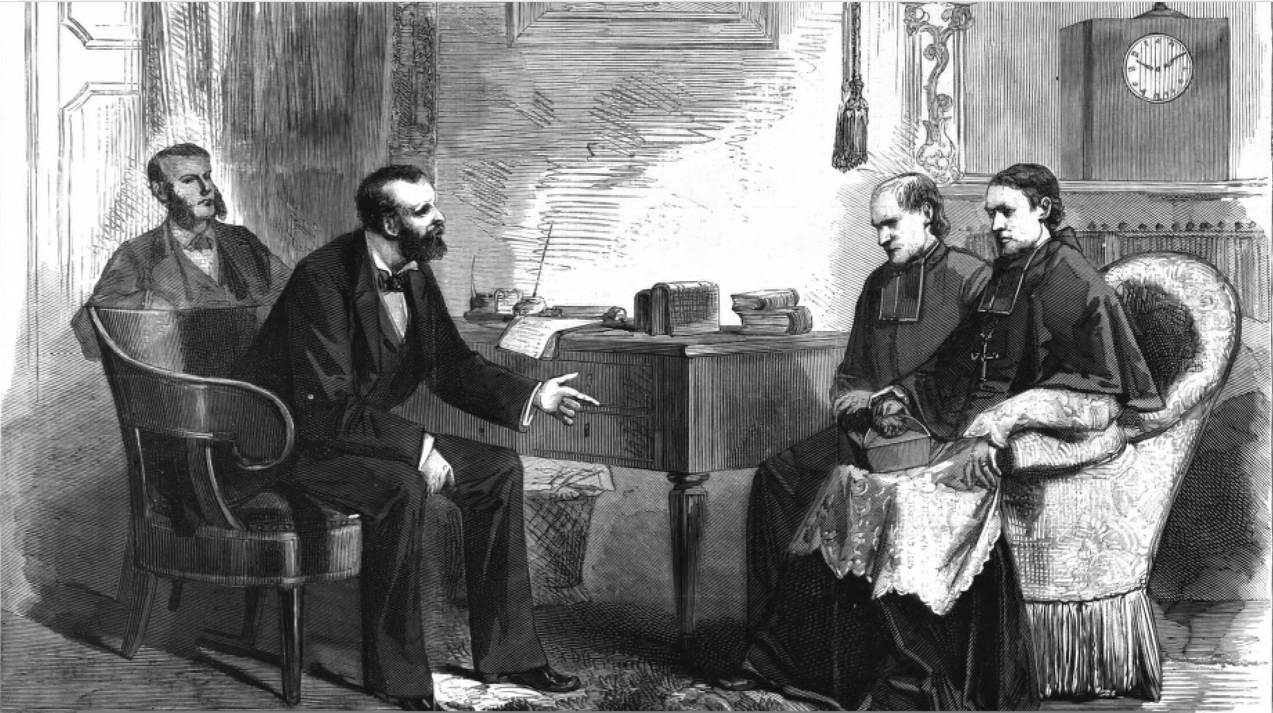 Anatole de Cabrières notifiant à Louis Fresne, préfet de l'Hérault, son excommunication suite à l'expulsion des Carmes de Montpelliers le 16 octobre 1880.